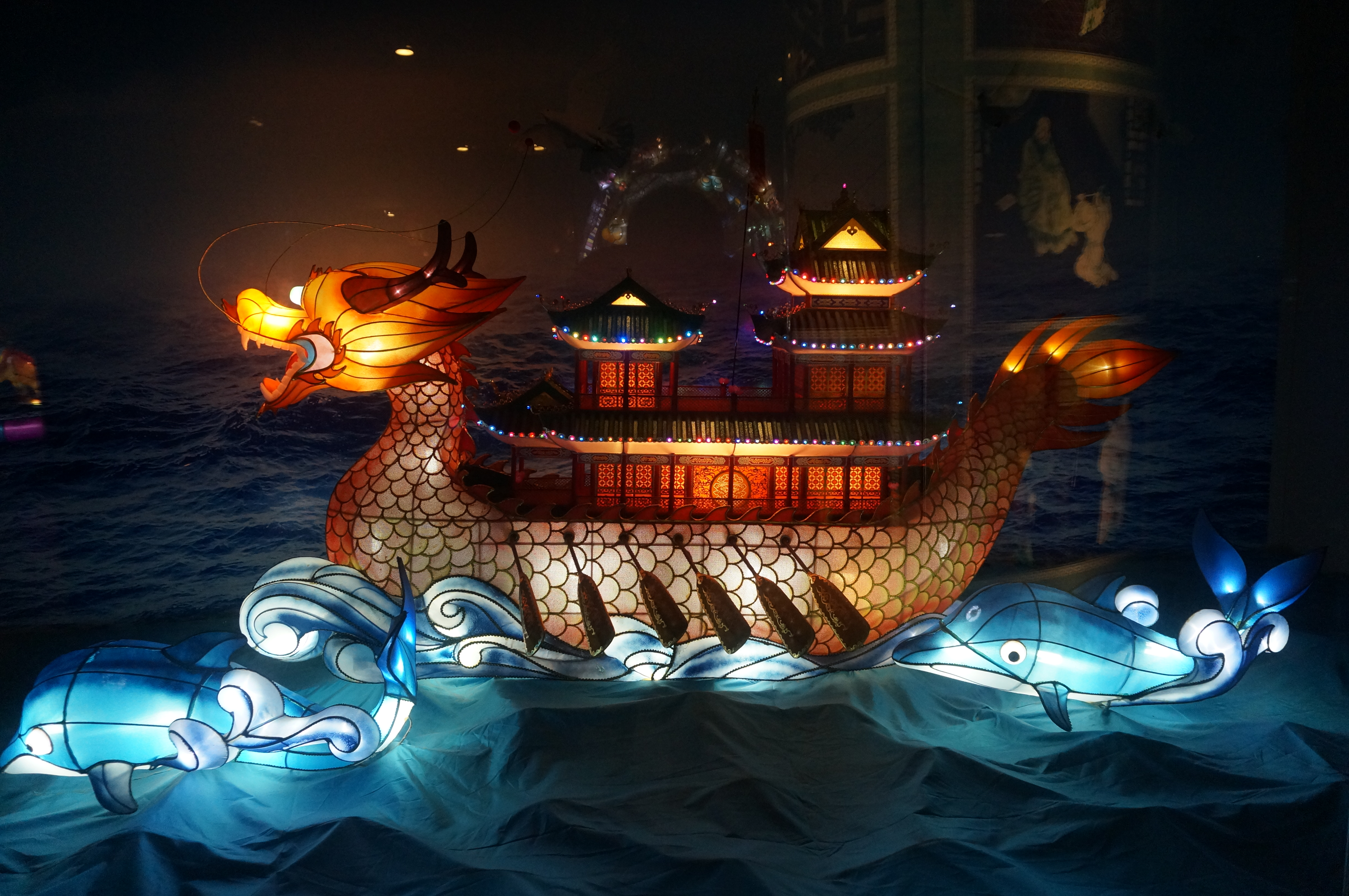 海宁硖石彩灯之龙舟灯，长250cm，宽高均150cm。